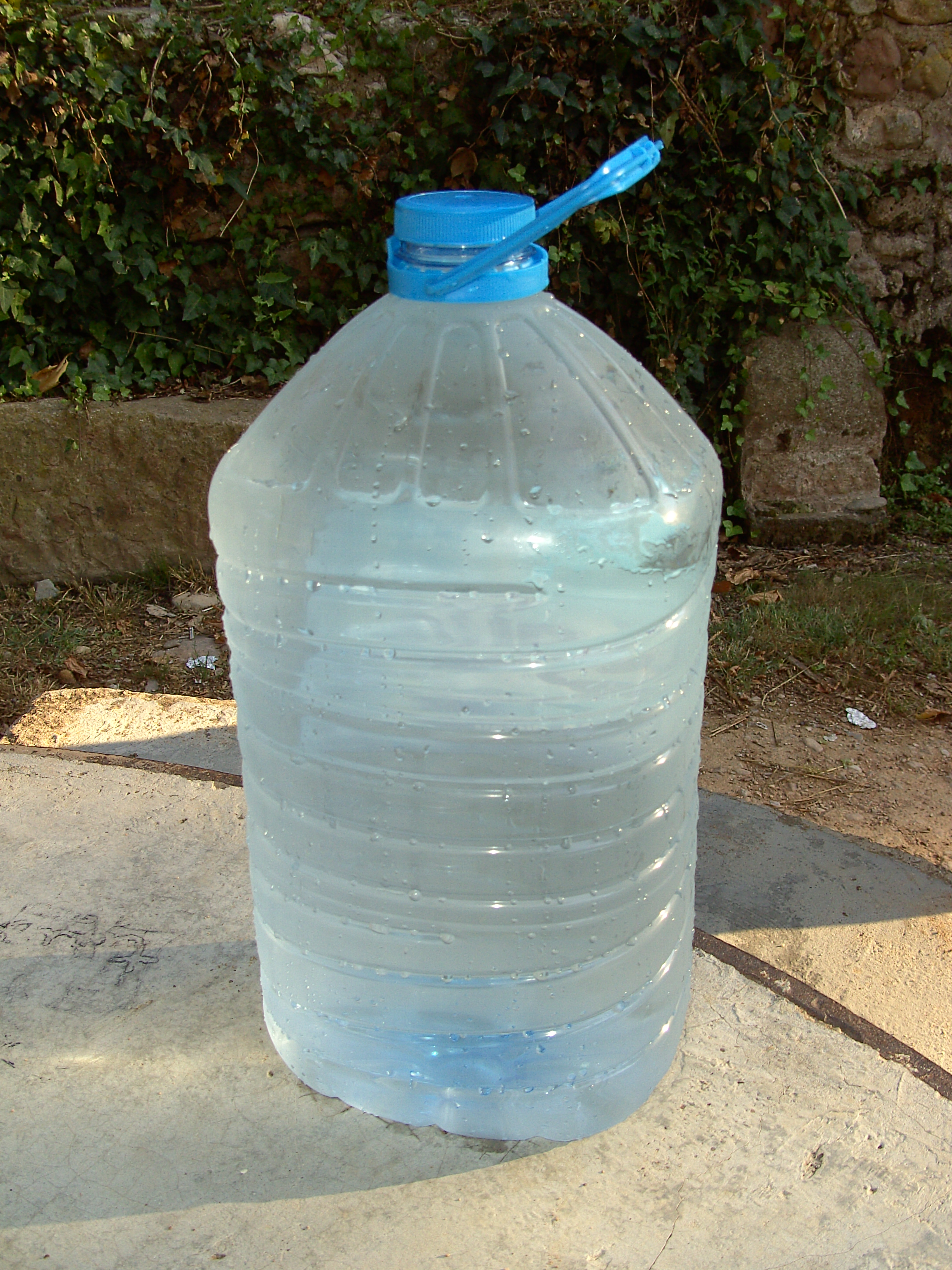 Garrafa de agua de 8 litros, donde se puede ver el efecto de la condensación.